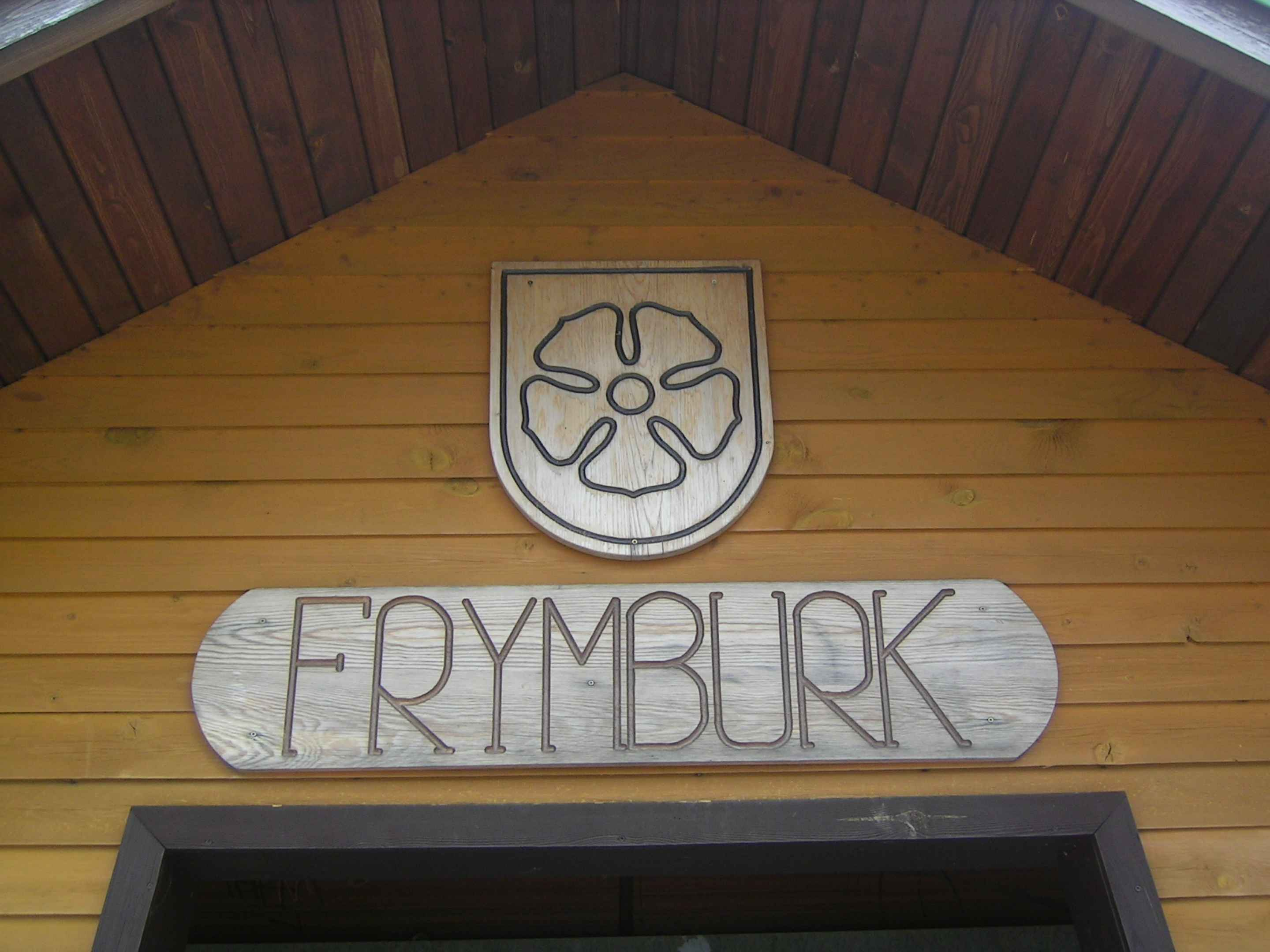 Bushaltestelle mit dem Wappen von Frymburk in Tschechien.